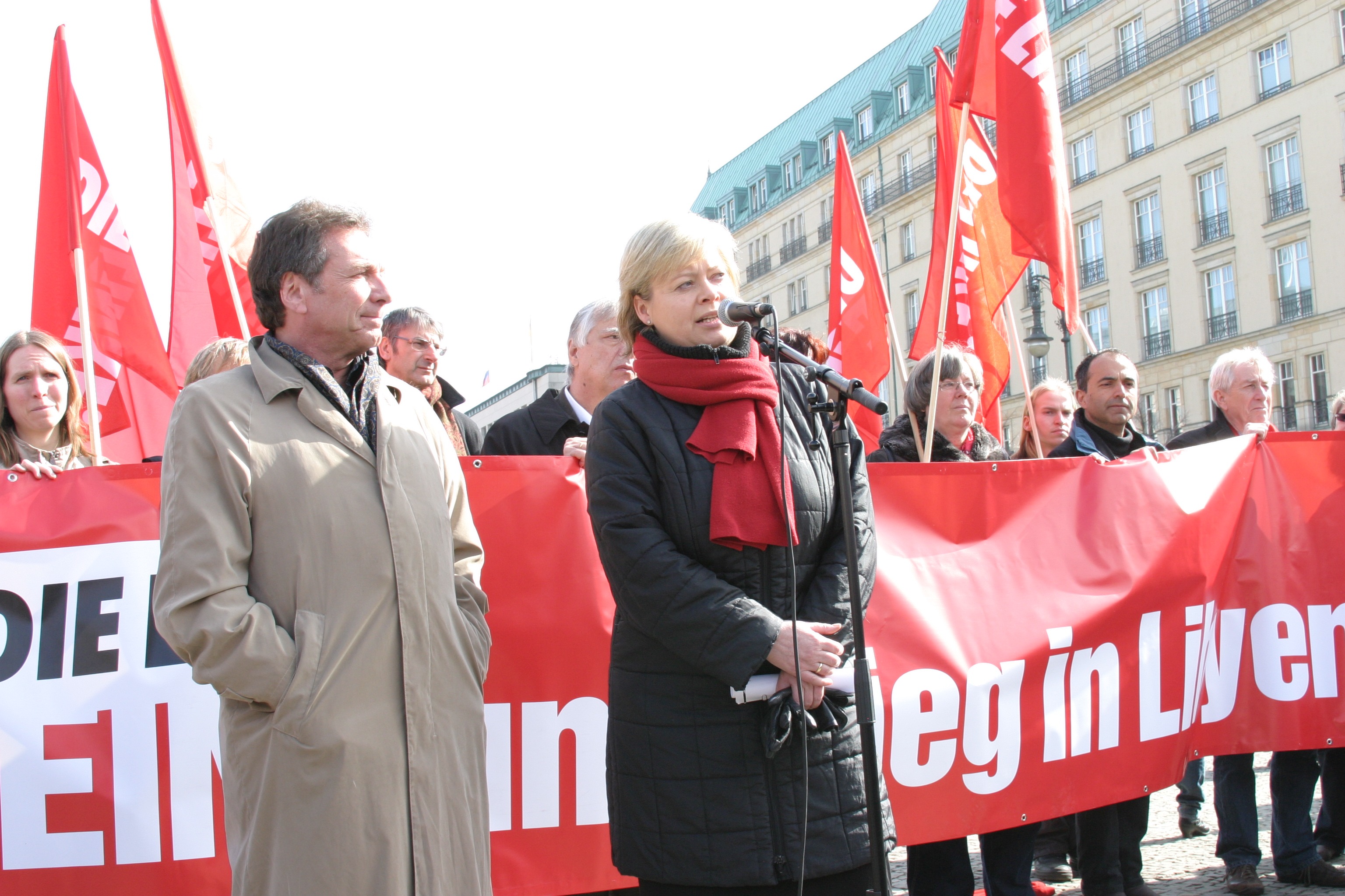 Gesine Lötzsch, Klaus Ernst